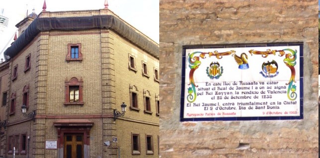 Mosaico en recuerdo del real de Jaime I, durante el sitio de Valencia en 1238.